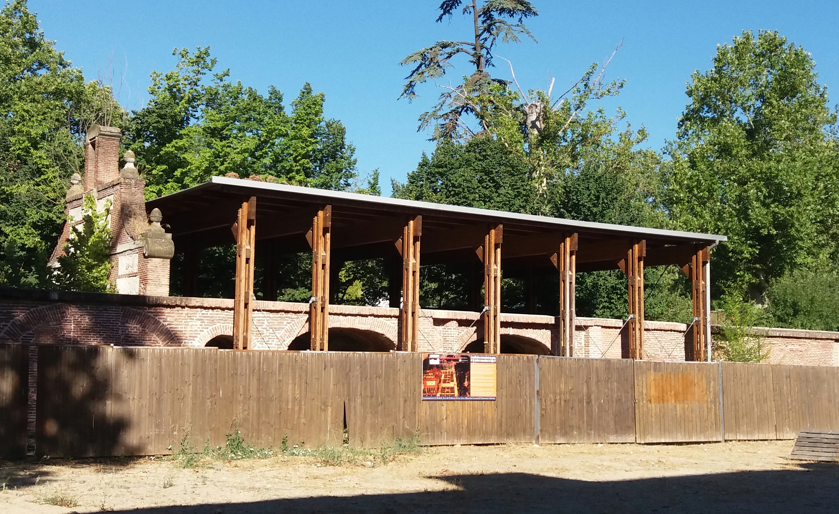 Aspecto de la Galería de las Grutas en 2016 (Casa de Campo, Madrid, España) (en restauración). Se trata de un pabellón renacentista del segundo tercio del siglo XVI, mandado construir por Felipe II para el Real Sitio de la Casa de Campo de Madrid, según proyecto del arquitecto Juan Bautista de Toledo.